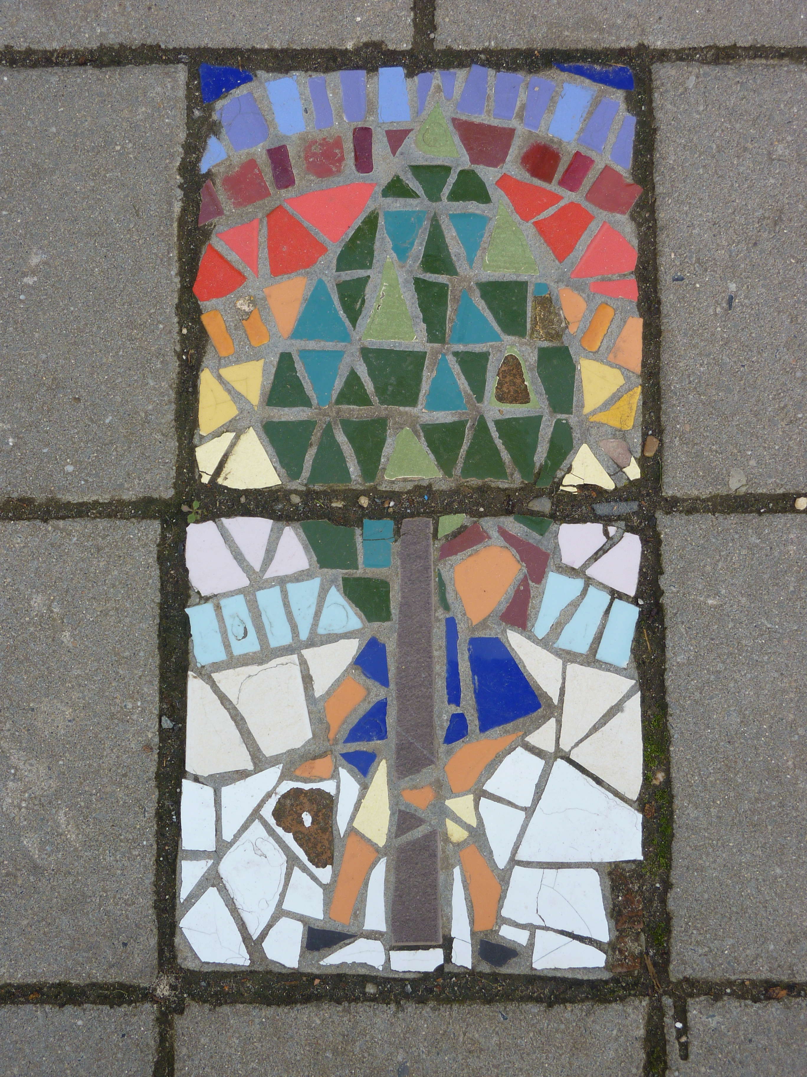 Street art à la placette du Peuplier à Schaerbeek, Bruxelles, Belgique.